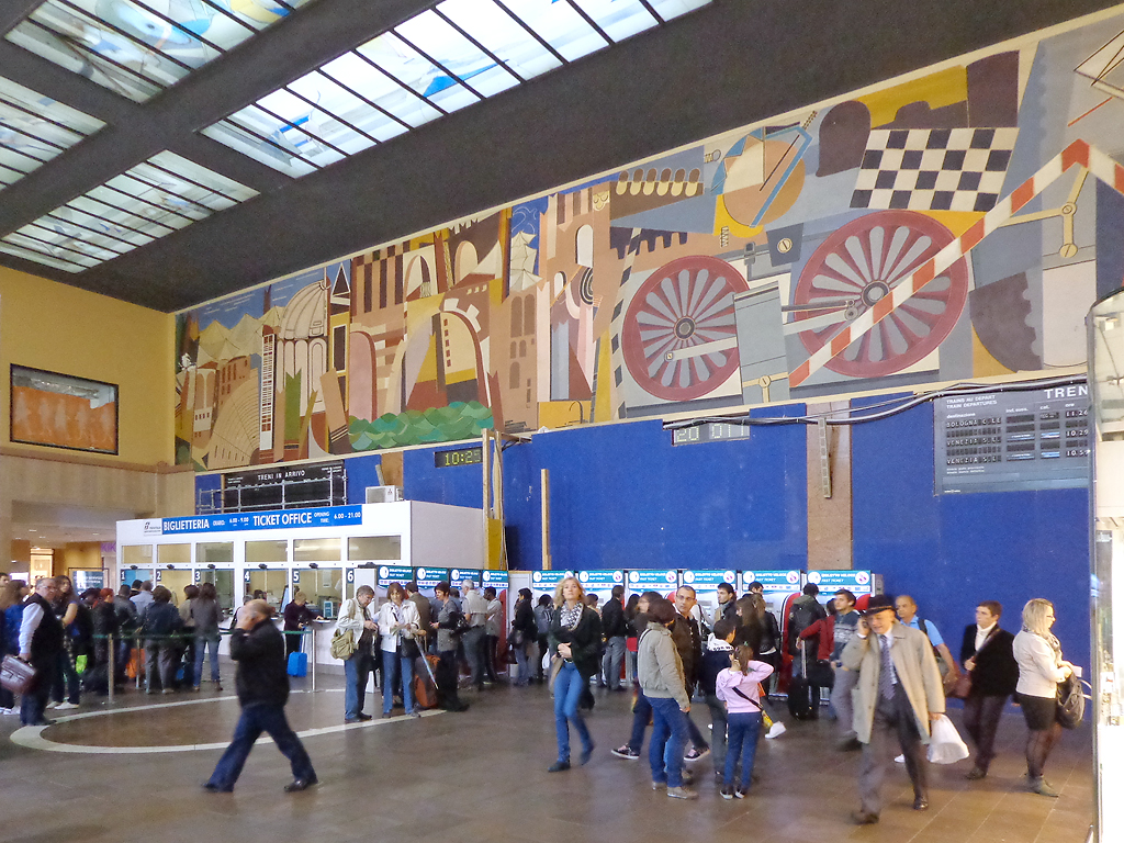 Stazione ferroviaria di Verona Porta Nuova, interno.